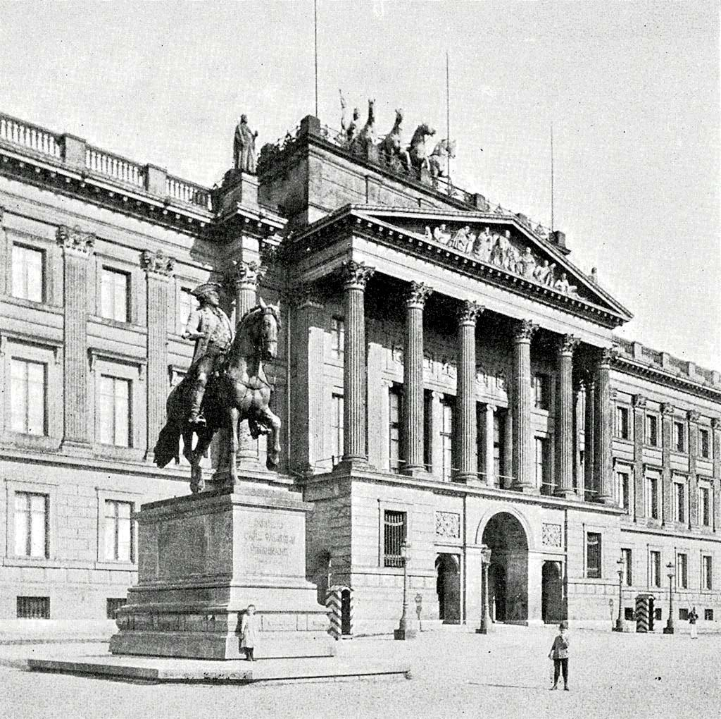 Braunschweig: Mittelbau des Residenzschlosses um 1897